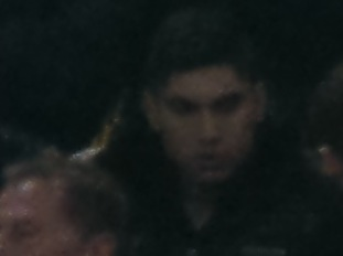 Ontivero